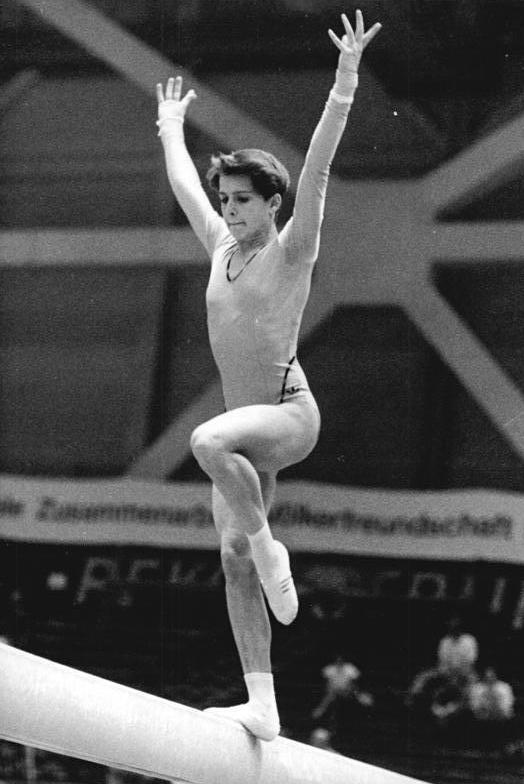 Dörte Thümmler ADN-ZB Gahlbeck 24.7.88 Leipzig: DDR-Turnmeisterschaften Dörte Thümmler vom SC Dynamo Berlin wurde DDR-Meisterin auf dem Schwebebalken (Foto) und im Bodenturnen. Für ihre Bodenkür erhielt die Stufenbarren-Weltmeisterin eine "10".